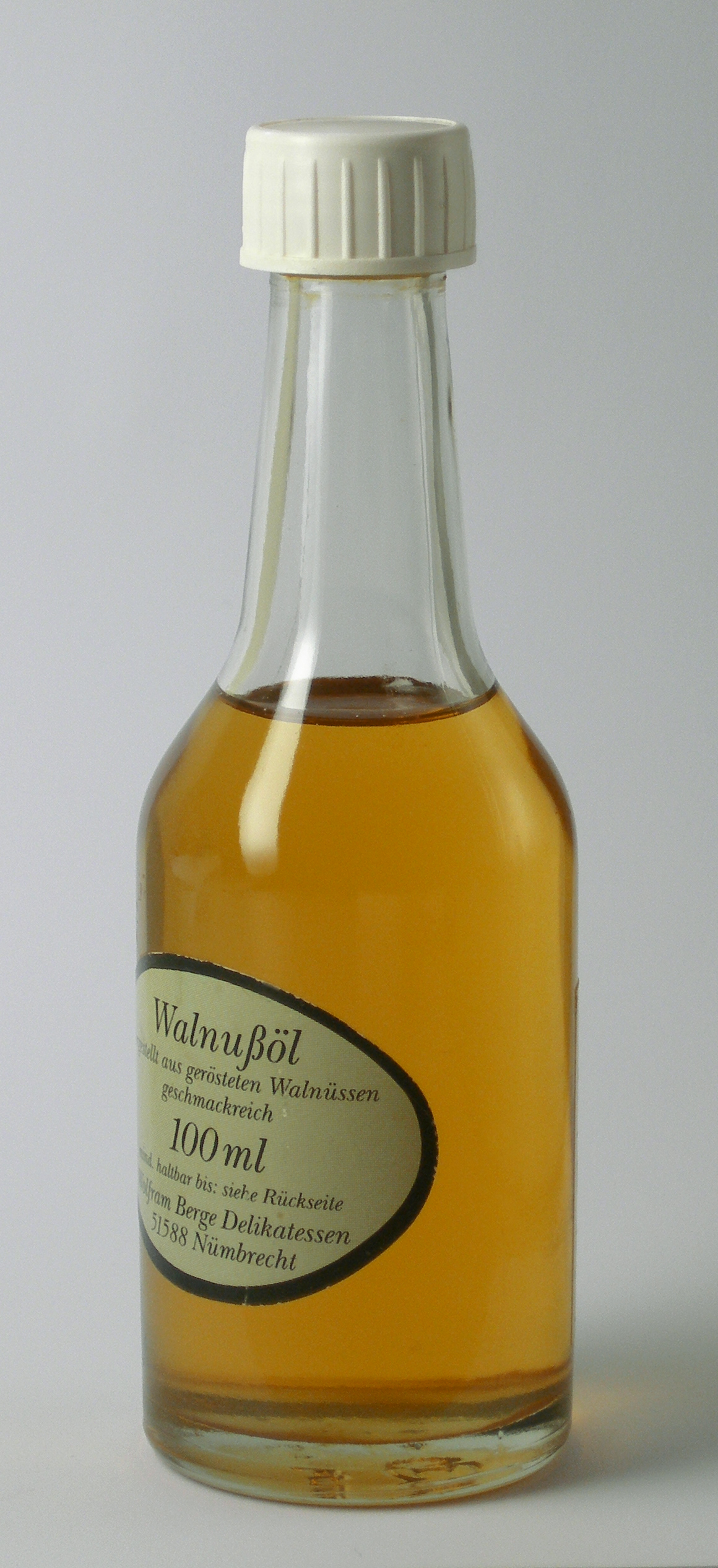 Walnussöl, walnut oil